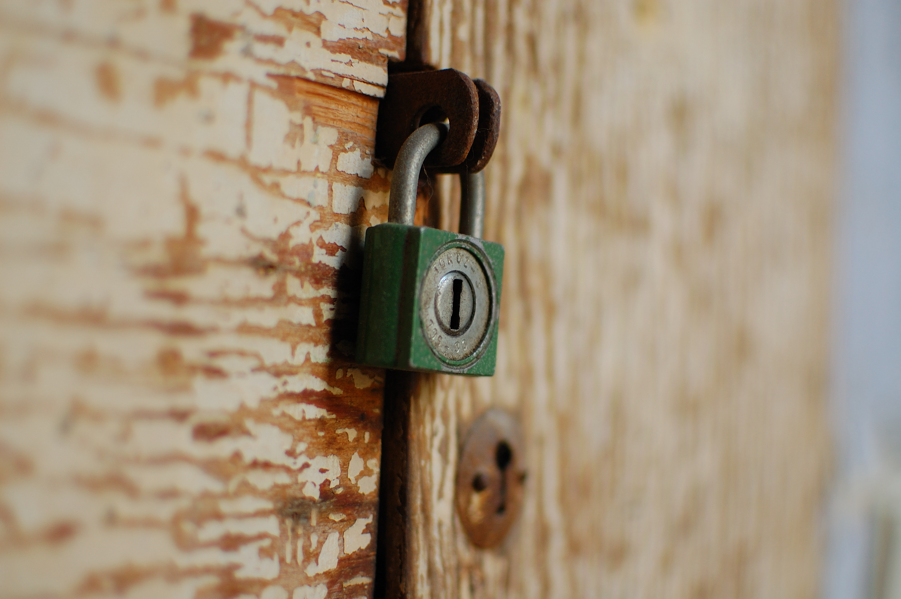 Padlock.